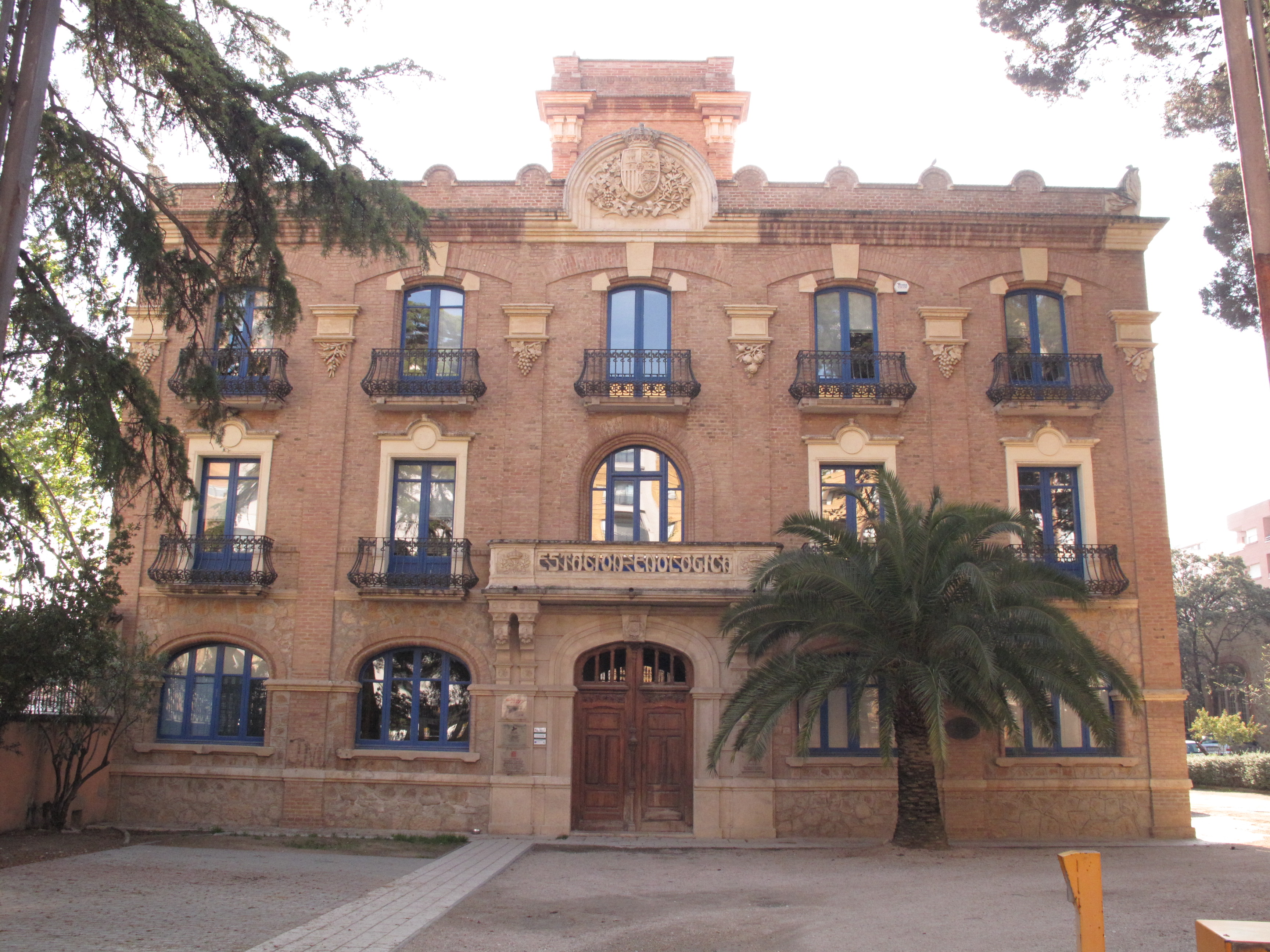 Estació Enològica (Reus)